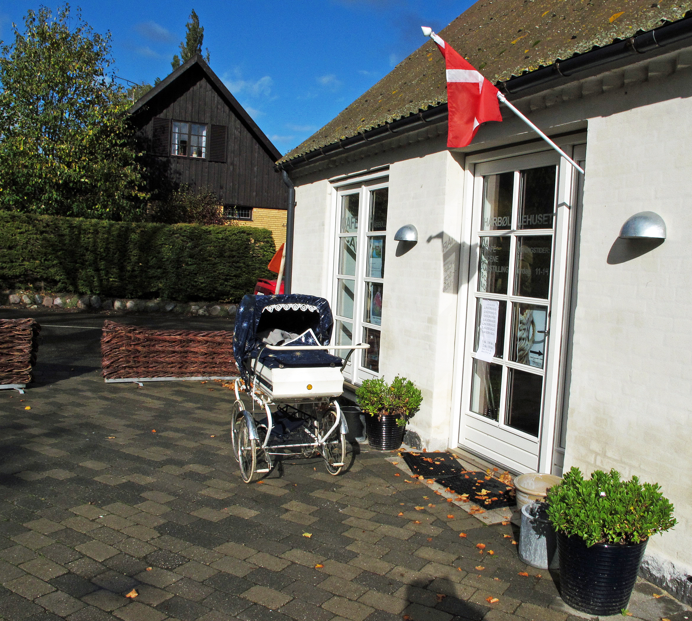 Hårbøllehusets facade. fotograf. Ulla Munch-Petersen